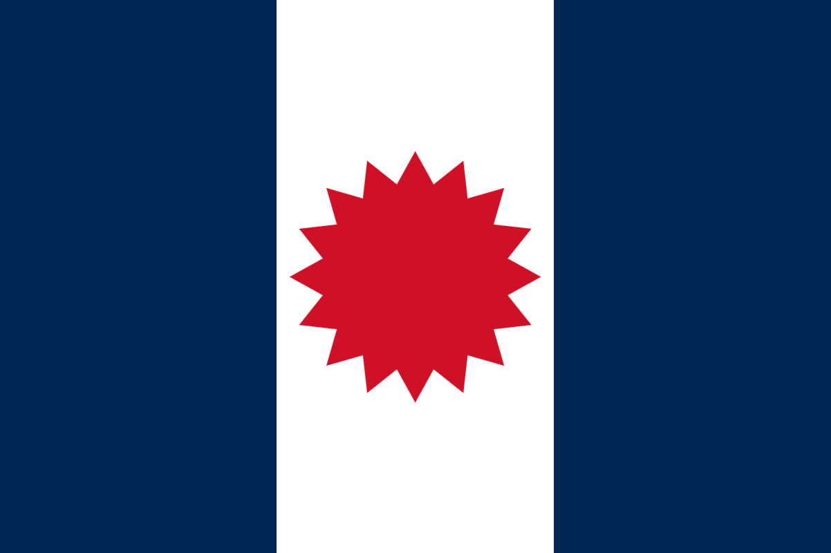 Flag of Deo family, used since 1950.